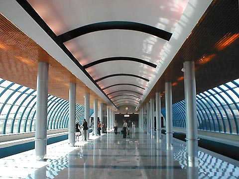 Kazan Metro Ametiyevo Station Станция "Аметьево" метро Казани